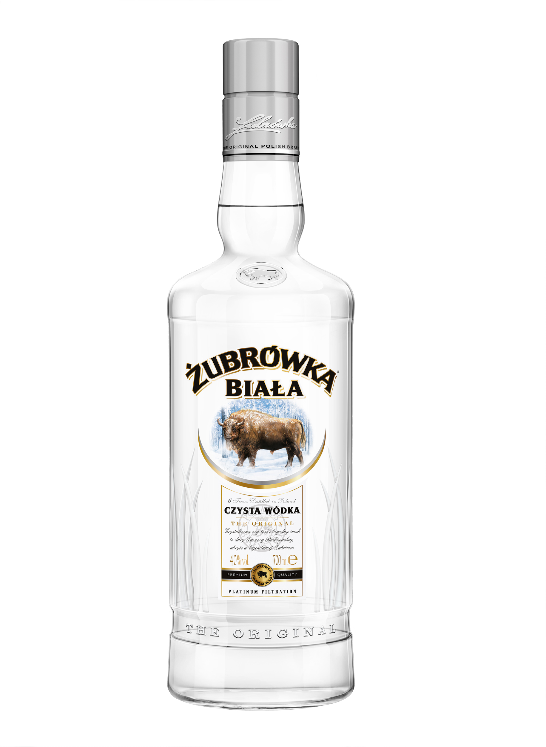 Butelka 700ml